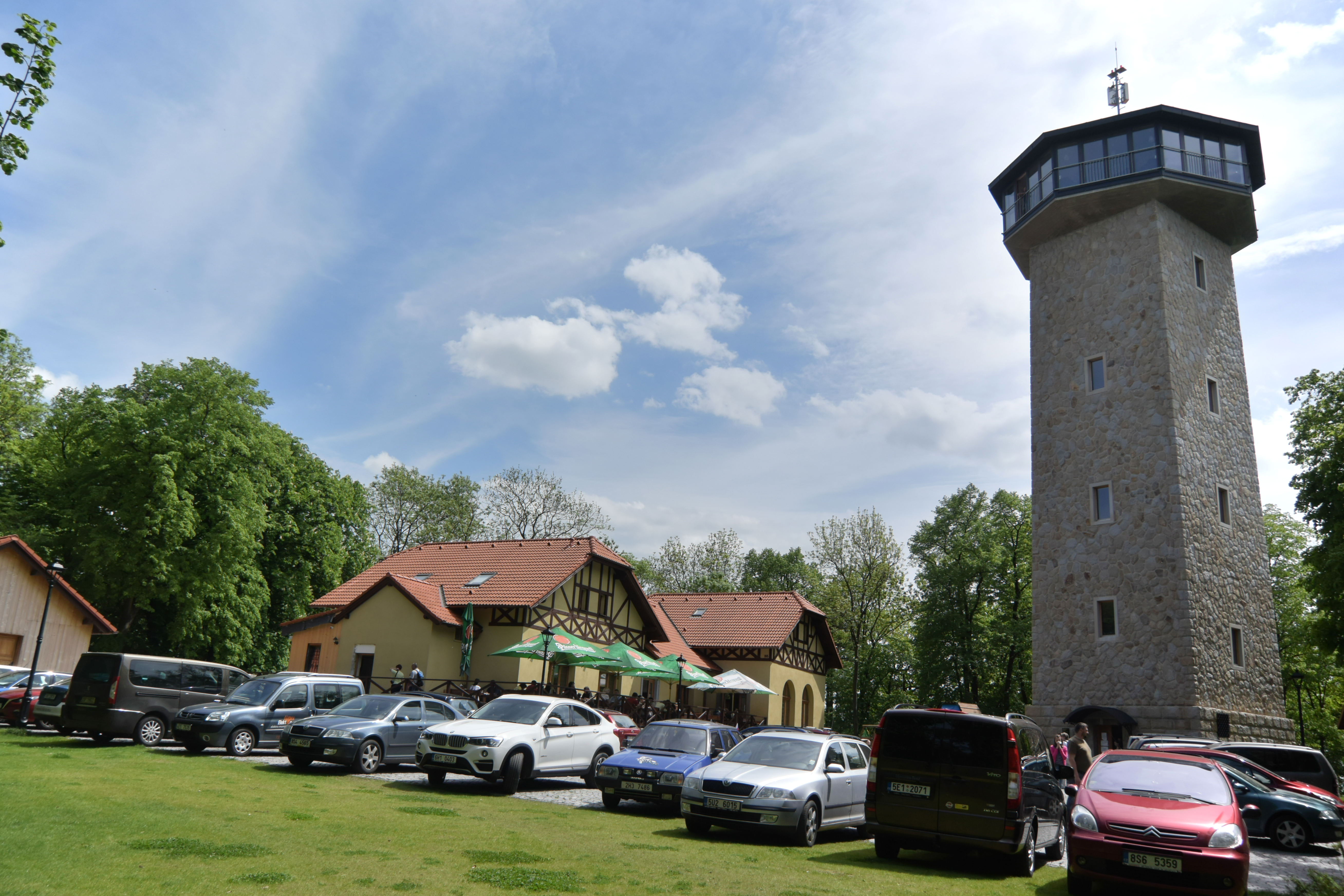 Budova rozhledny s restaurací a parkovištěm